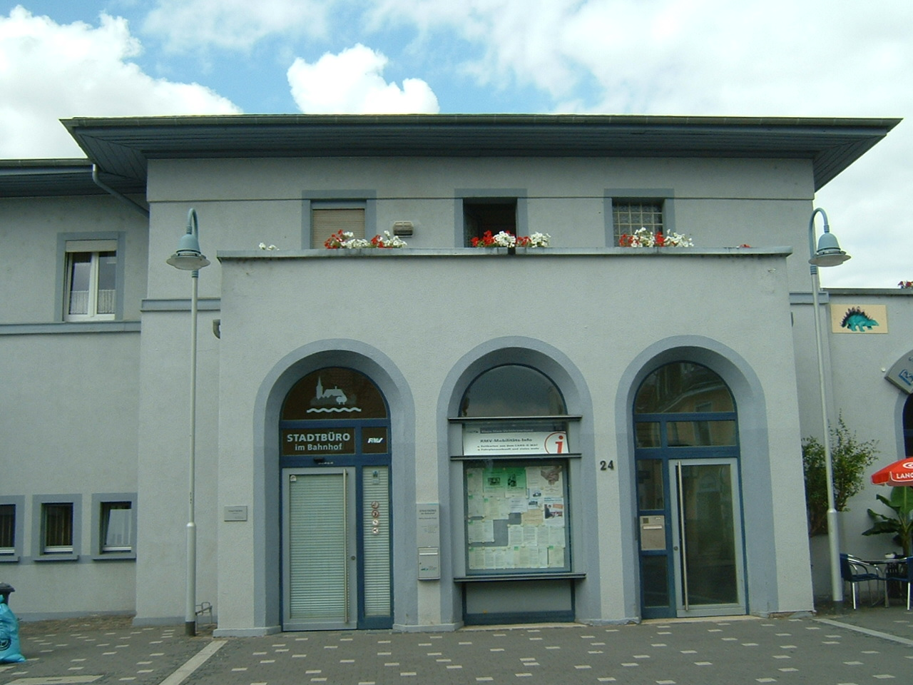 Bahnhofsgebäude Flörsheim am Main erbaut 1839 von Architekt Ignaz Opfermann